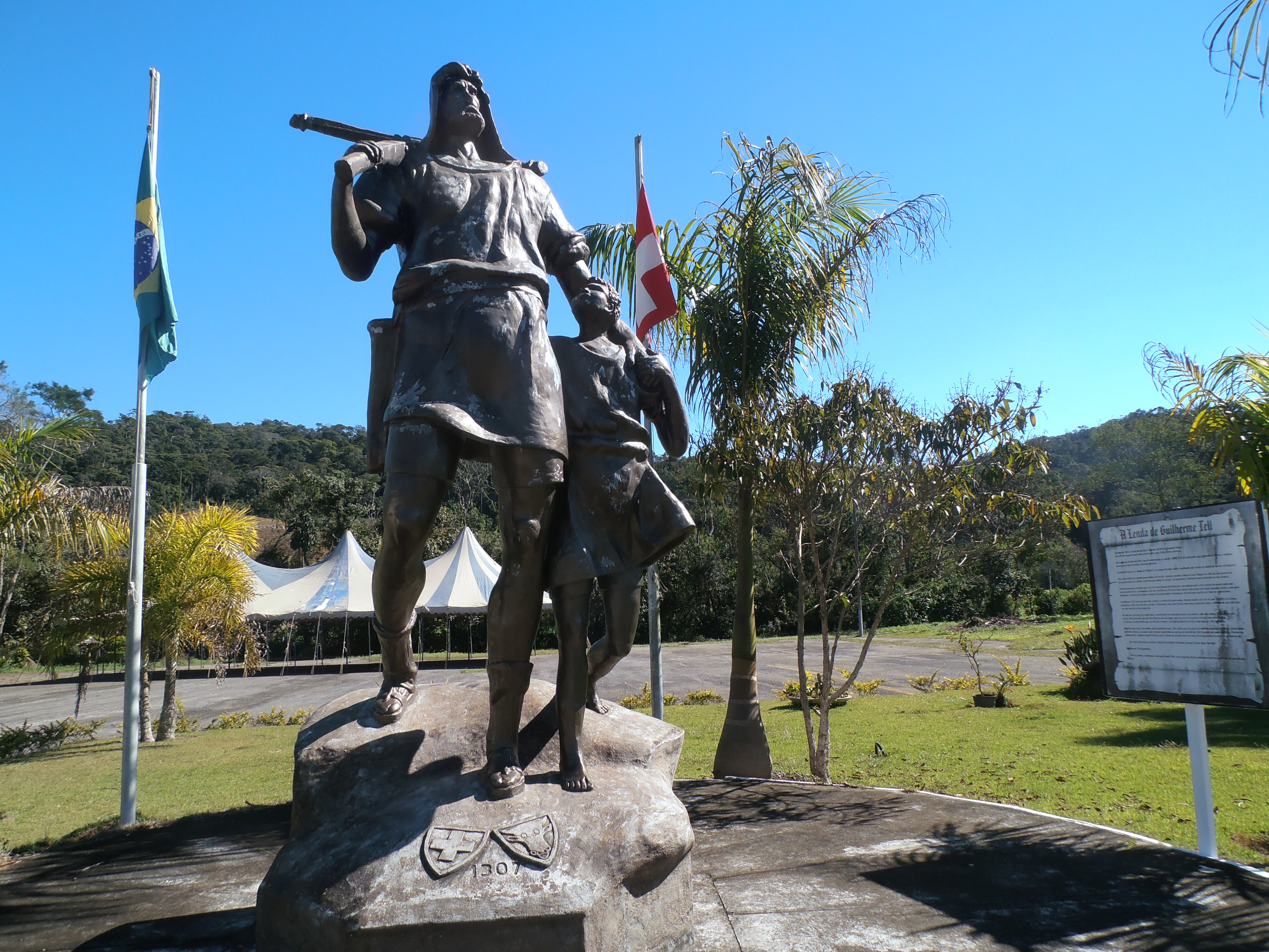 Nava Friburgo RJ Brasil - Queijaria Suiça, Estátua de Guilherme Tell